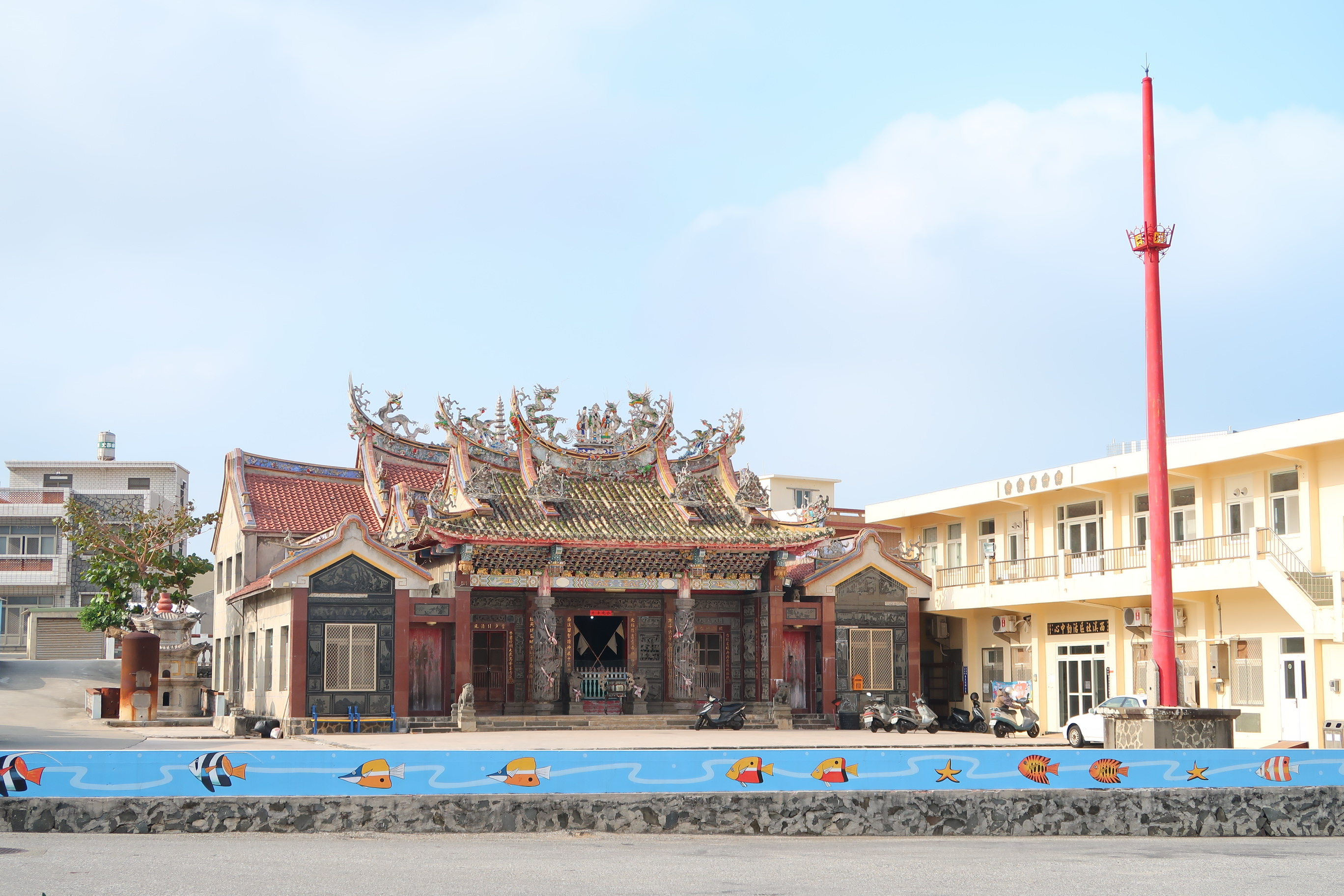 台灣湖西鄉西溪村廟宇，主祀玄天上帝。